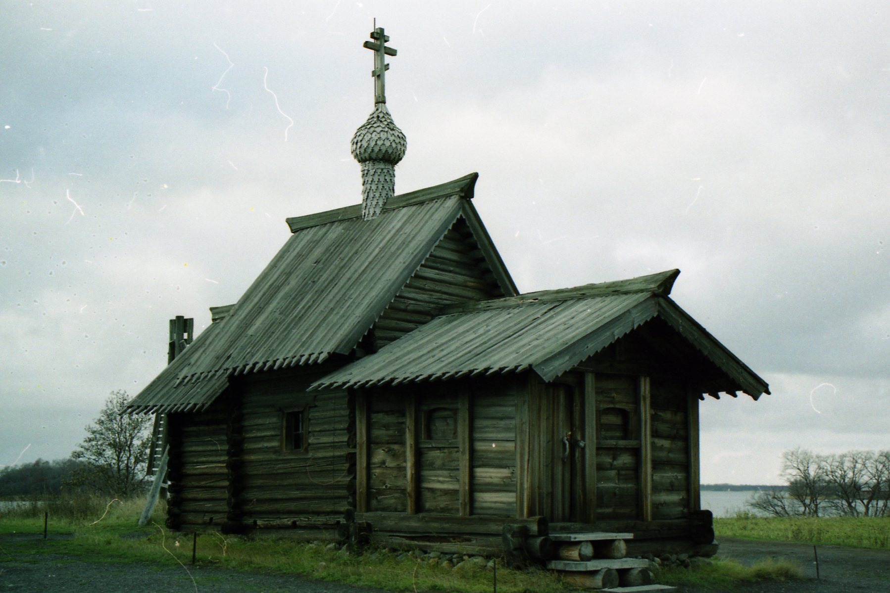 Церковь Воскрешения Лазаря (деревянная), из Муромского монастыря (Республика Карелия, Медвежьегорск, о. Кижи, музей-заповедник деревянного зодчества "Кижи")